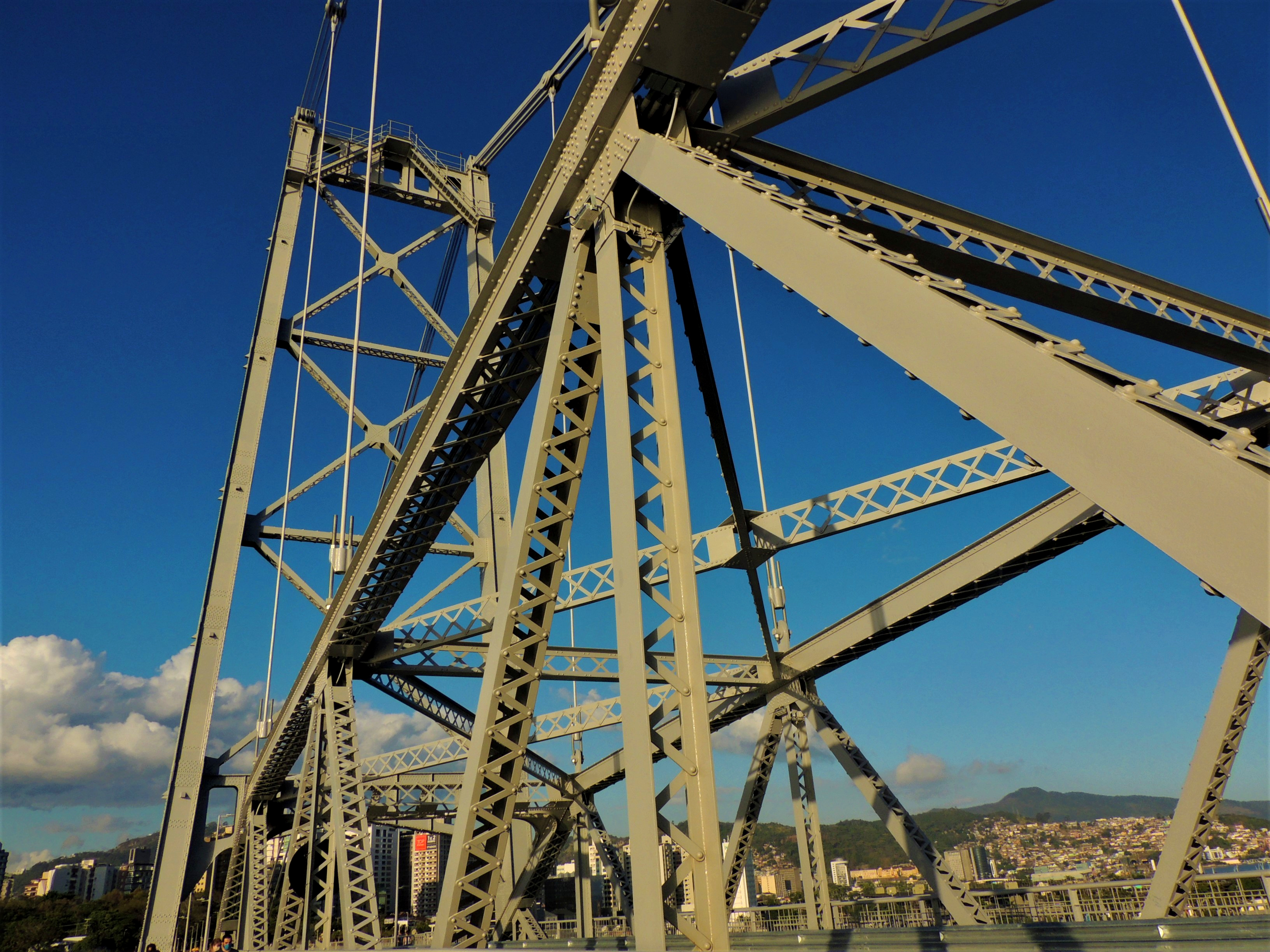 A Ponte Hercílio Luz é uma ponte pênsil localizada em Florianópolis (Nossa Senhora Do Desterro), no estado brasileiro de Santa Catarina. É a maior ponte suspensa do Brasil, com 821 metros - sendo a maior ponte pênsil sustentada por um sistema de barras de olhal ainda existente, e possui o 132º maior vão pênsil do mundo, com 339 metros. Apelidada de "Velha Senhora", é o símbolo mais famoso da cidade e do estado, sendo a imagem mais reconhecida de ambos. A ponte foi projetada e construída durante o governo de Hercílio Luz para ser a primeira ligação terrestre entre a ilha e o continente. O idealizador não viu seu sonho ser concluído, pois morreu em 1924, doze dias depois de inaugurar uma réplica de madeira. O projeto é de autoria dos engenheiros norte-americanos Robinson e Steinman, e todo o material nela empregado foi trazido dos Estados Unidos, tendo sido construída por equipe composta de dezenove técnicos especializados norte-americanos e operários catarinenses. Após anos fechada e apenas sendo mantida, uma parceria entre o Governo Federal, Governo do Estado e a Prefeitura de Florianópolis em 2005 proporcionou o início das obras de restauração da ponte Hercílio Luz. Em dezembro de 2019 o governo do estado confirmou a reabertura do trânsito na ponte, o que aconteceu no dia 30 de dezembro do mesmo ano.O fim das obras, entretanto, só aconteceu em 2020, com a retirada das estruturas auxiliares sob o vão central.